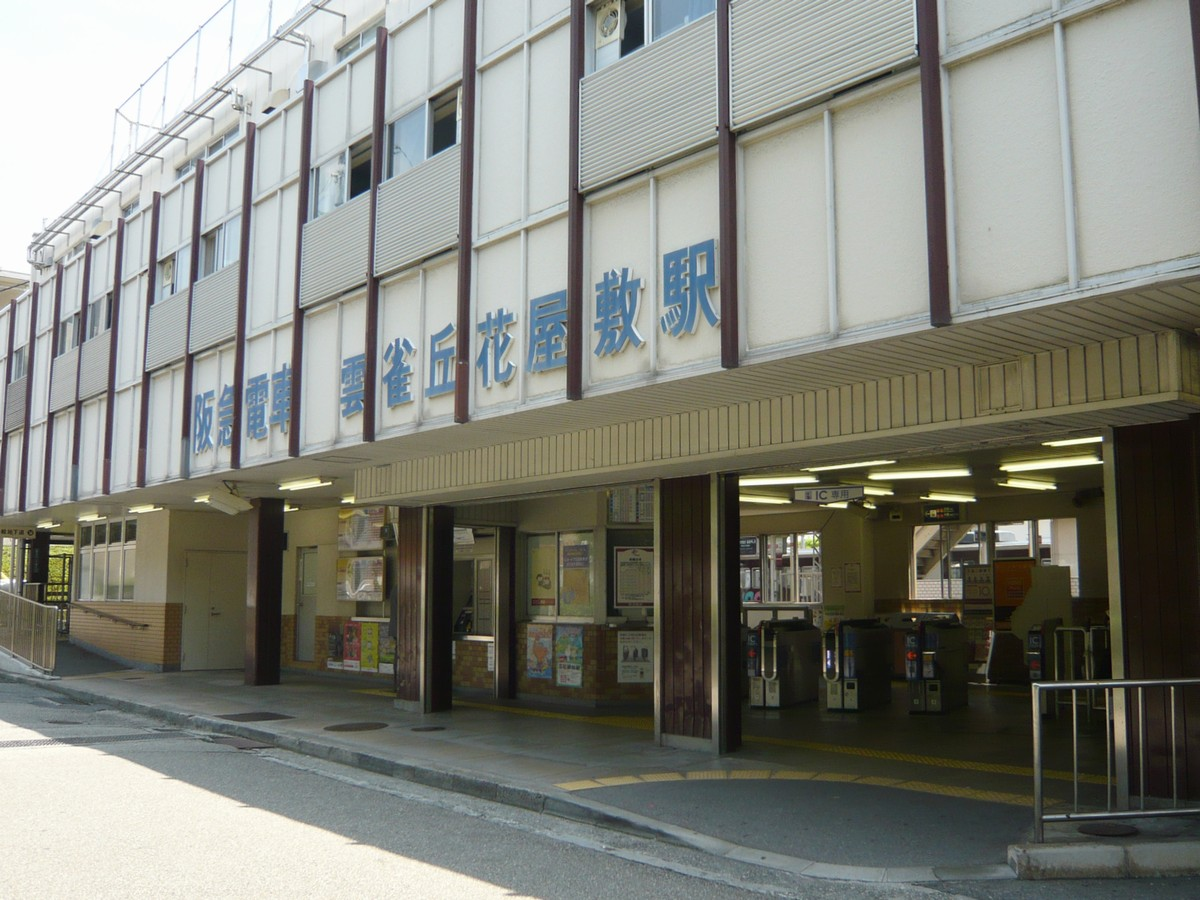 阪急雲雀丘花屋敷駅宝塚側駅舎 投稿者撮影（2007.08.06）